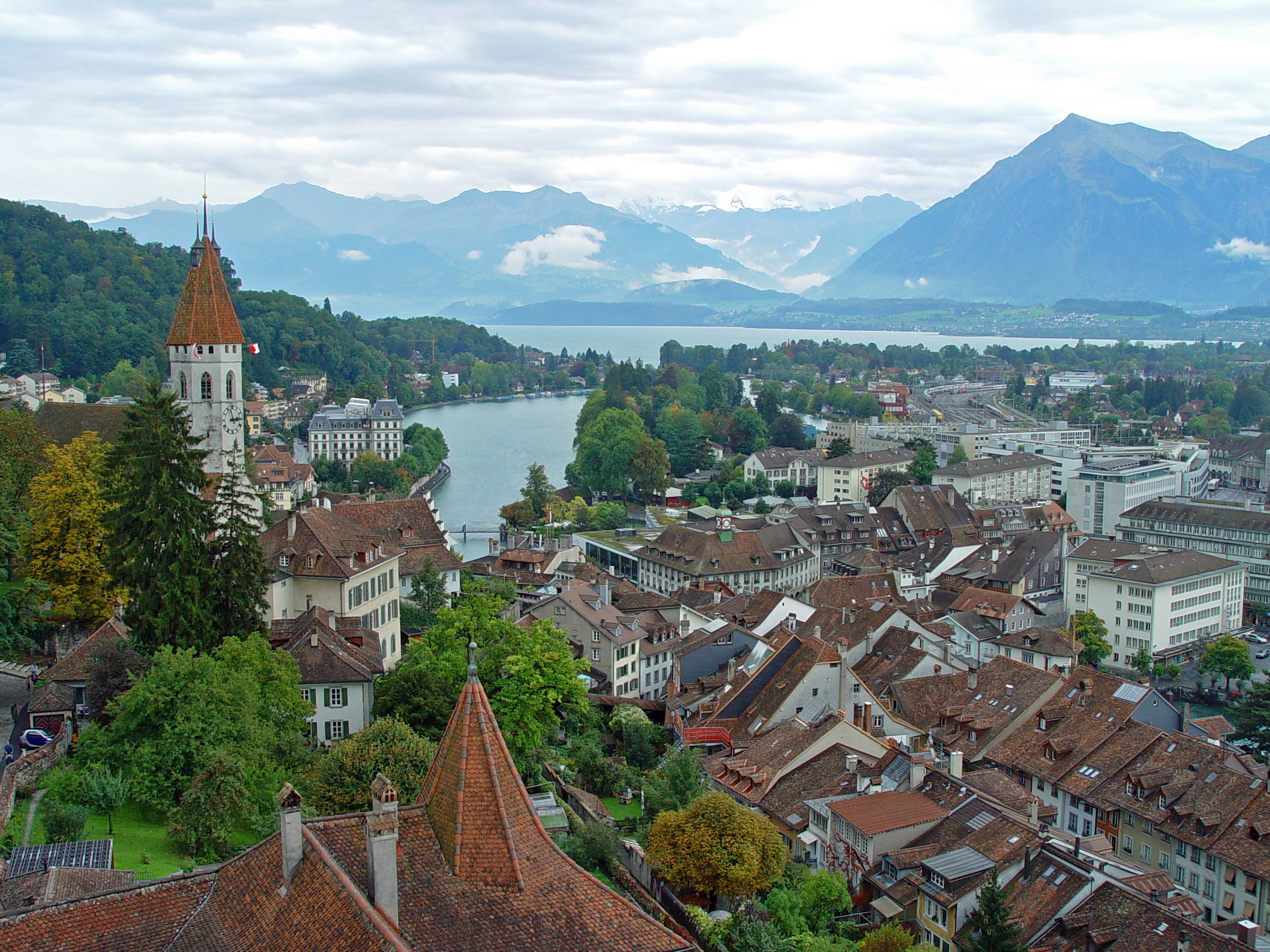 Thun, Switzerland